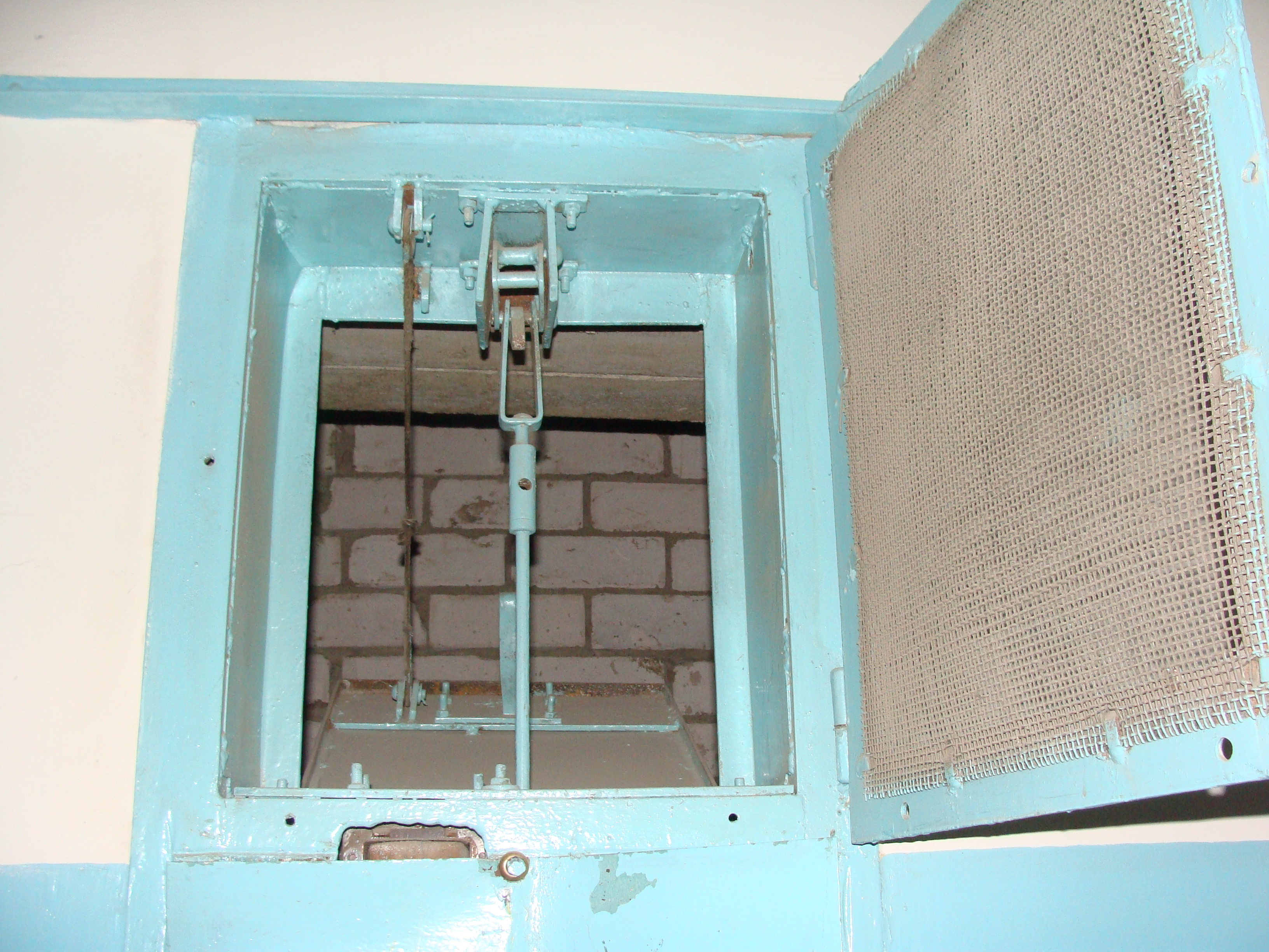 Сработавший клапан системы дымоудаления